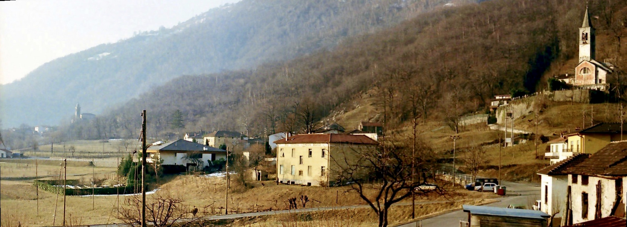 Mezzovico 1984